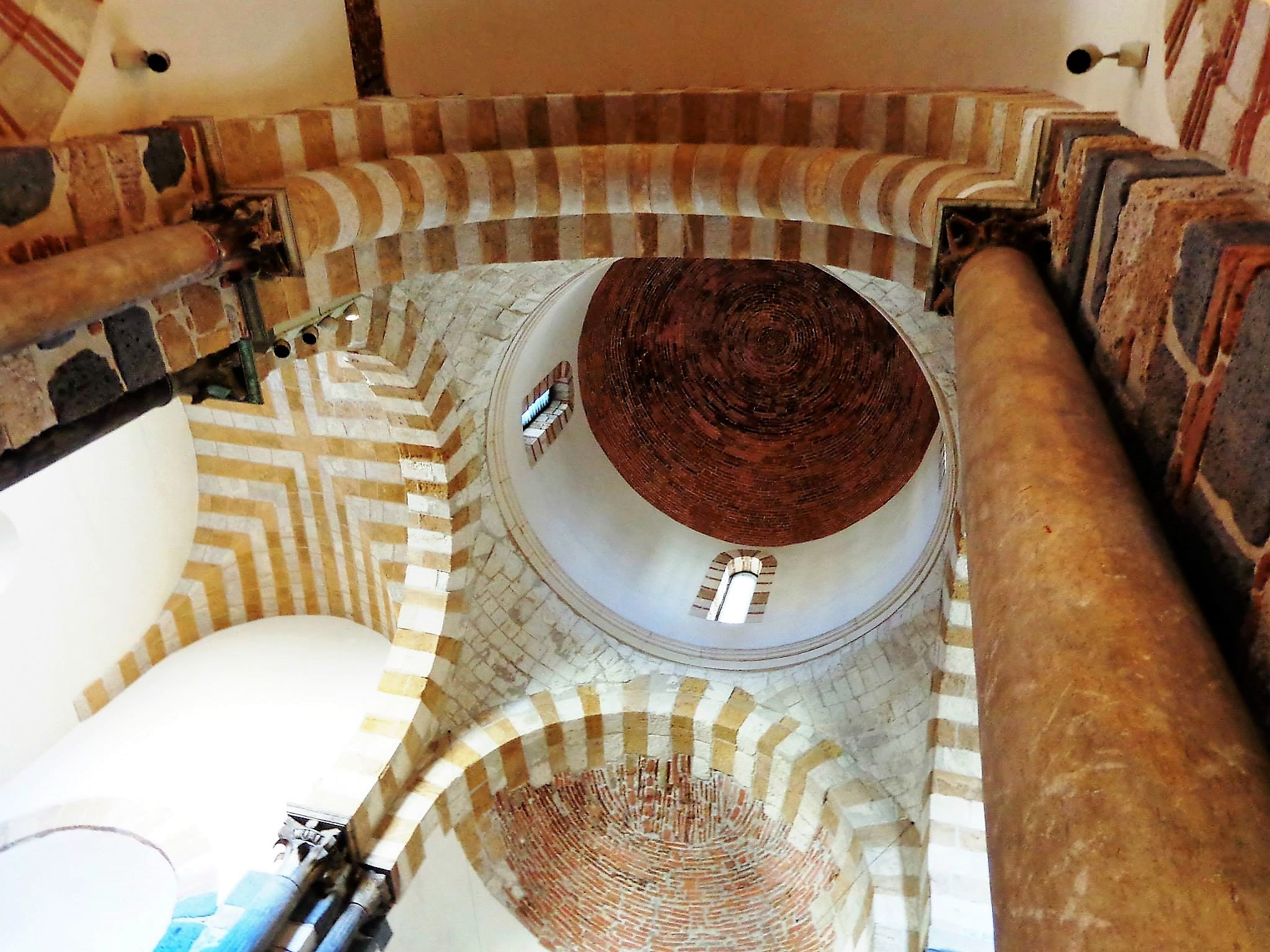 Chiesa dei Catalani